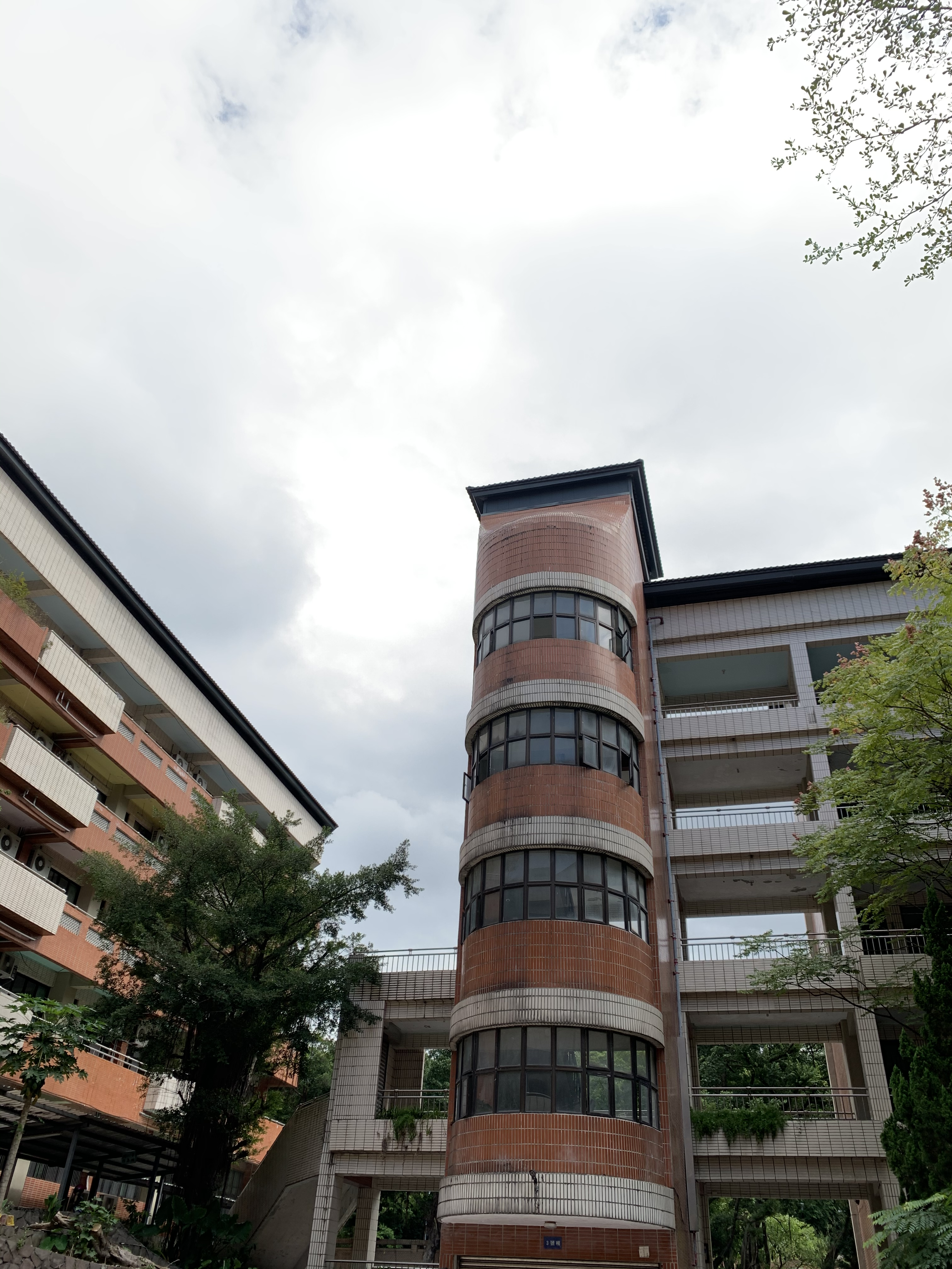 新北市立清水高中至善樓空地向至真樓方向拍攝